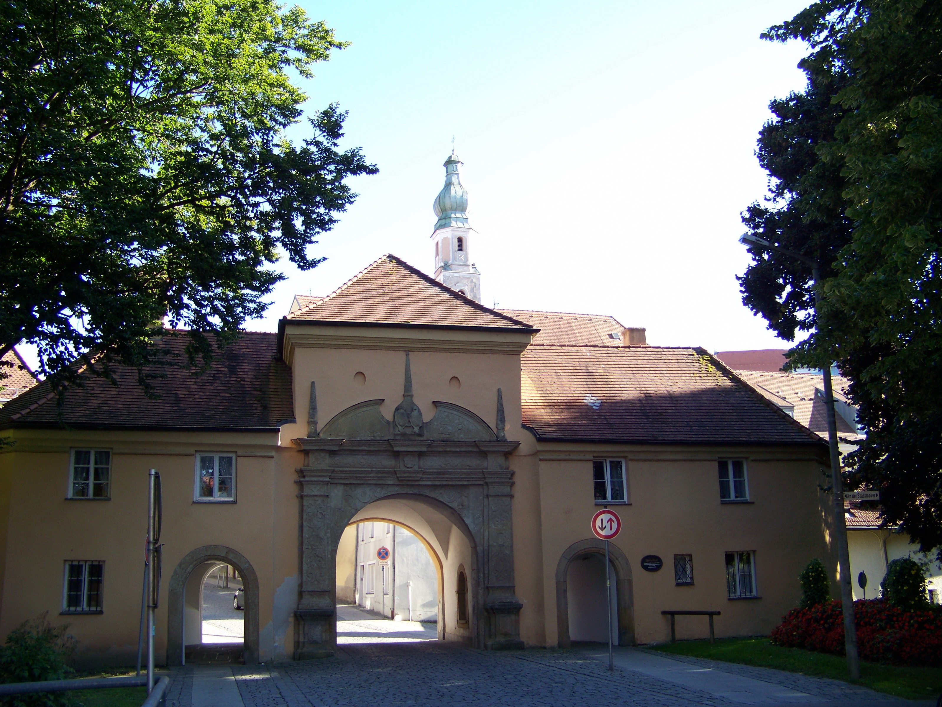 Straubing, Am Spitalthor 7 und 8. Spitaltor, spätmittelalterliches Torhaus, ausgebaut 1628. Im Hintergrund ist der Turm der Spitalkirche Hl. Dreifaltigkeit zu sehen.